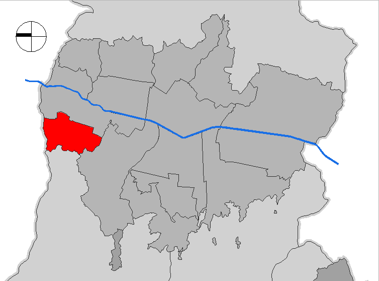 mapa de la comuna 12 de Octubre. Medellín, Colombia.